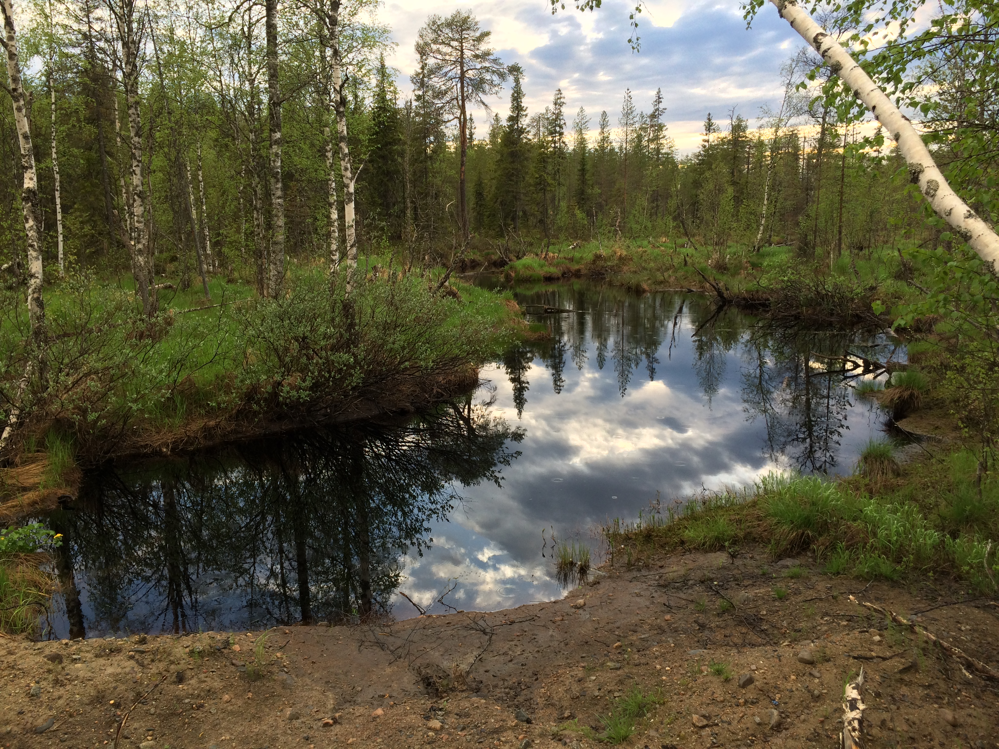 Вара (приток Терманта)